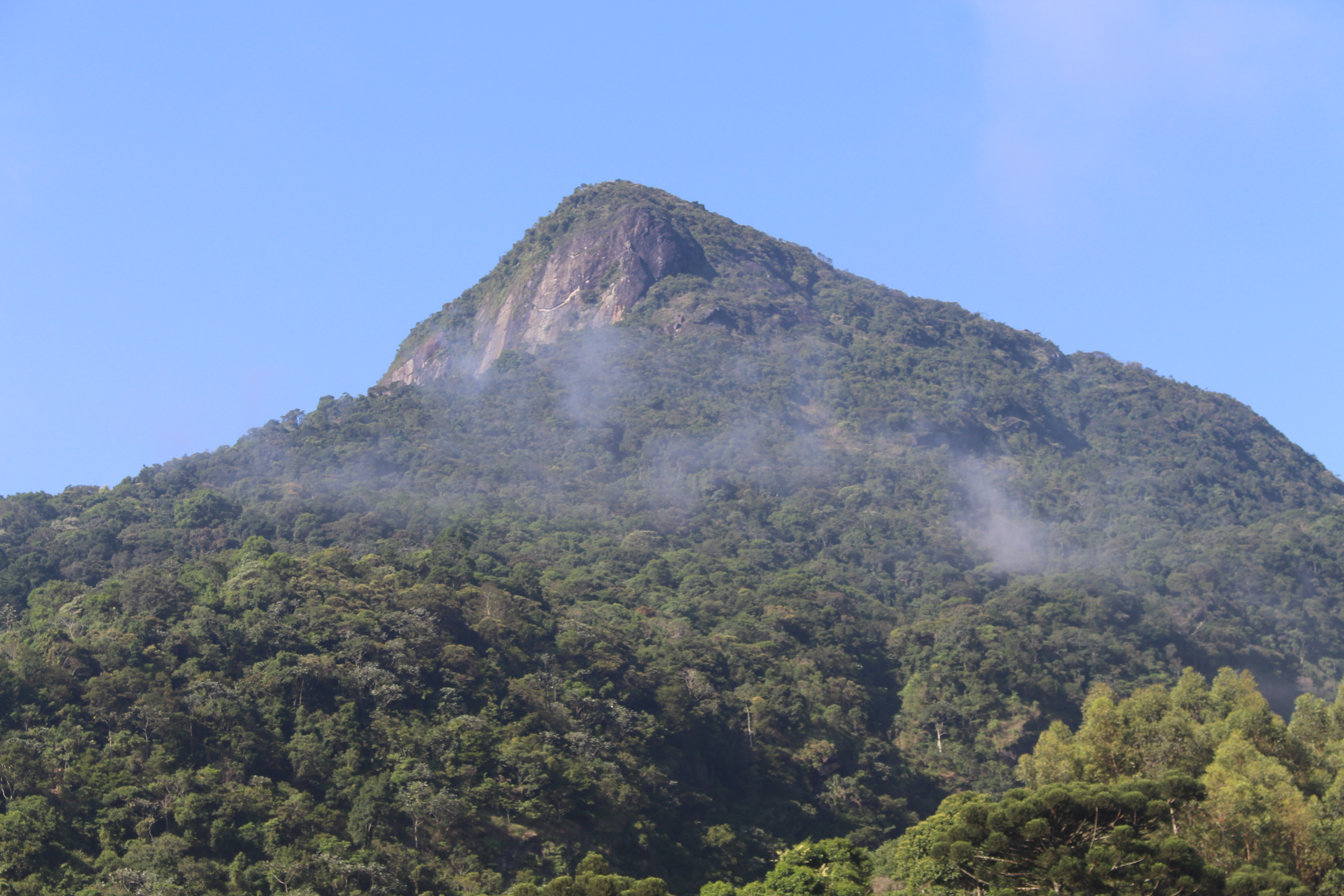 Pedra Grande é uma montanha na Serra da Mantiqueira, na foto algumas nuvens estão abaixo dela.